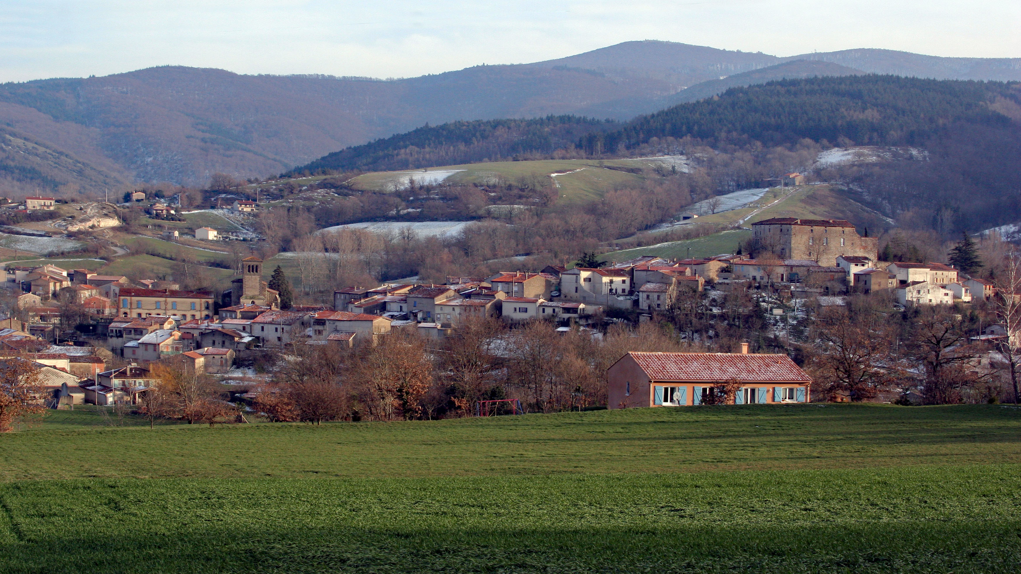 Vue générale